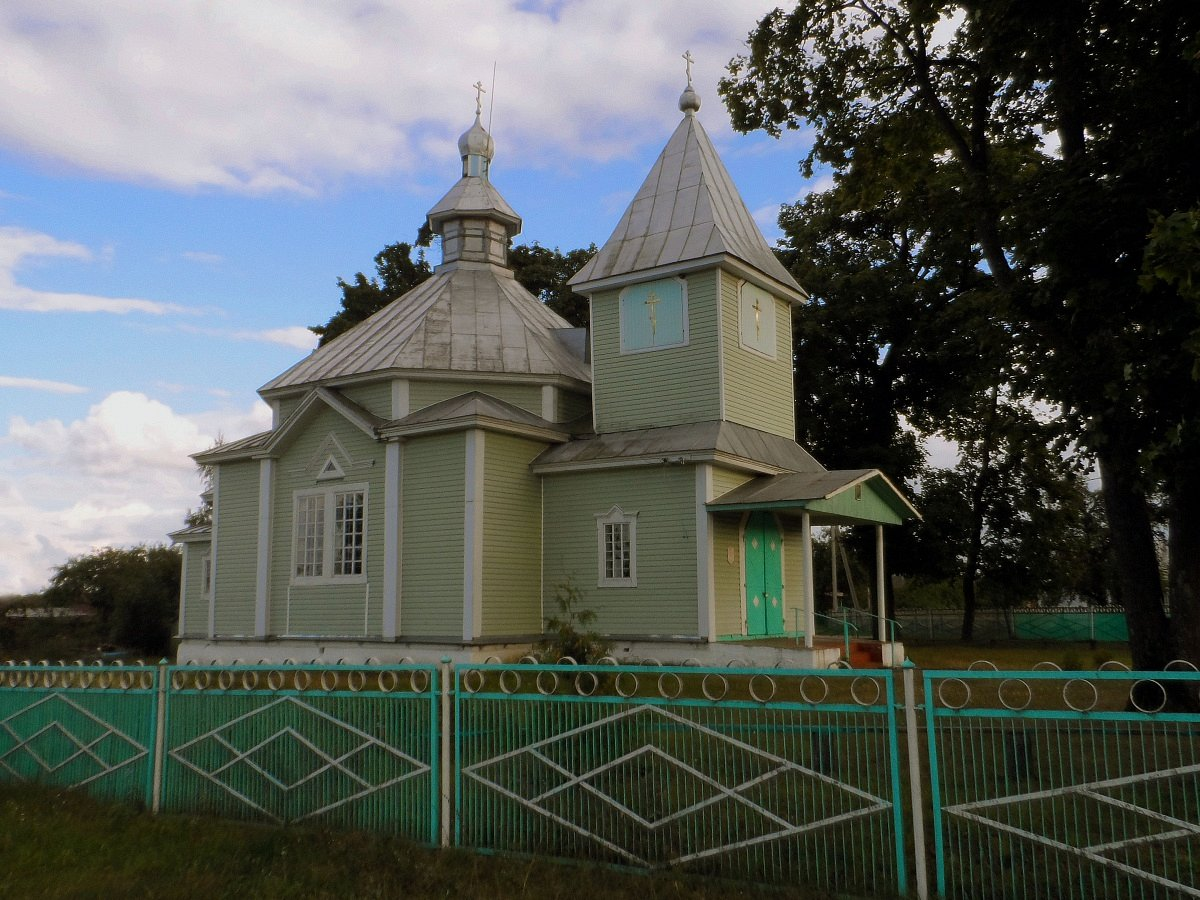 Бродніца. Свята-Крыжаўзвіжанская царква